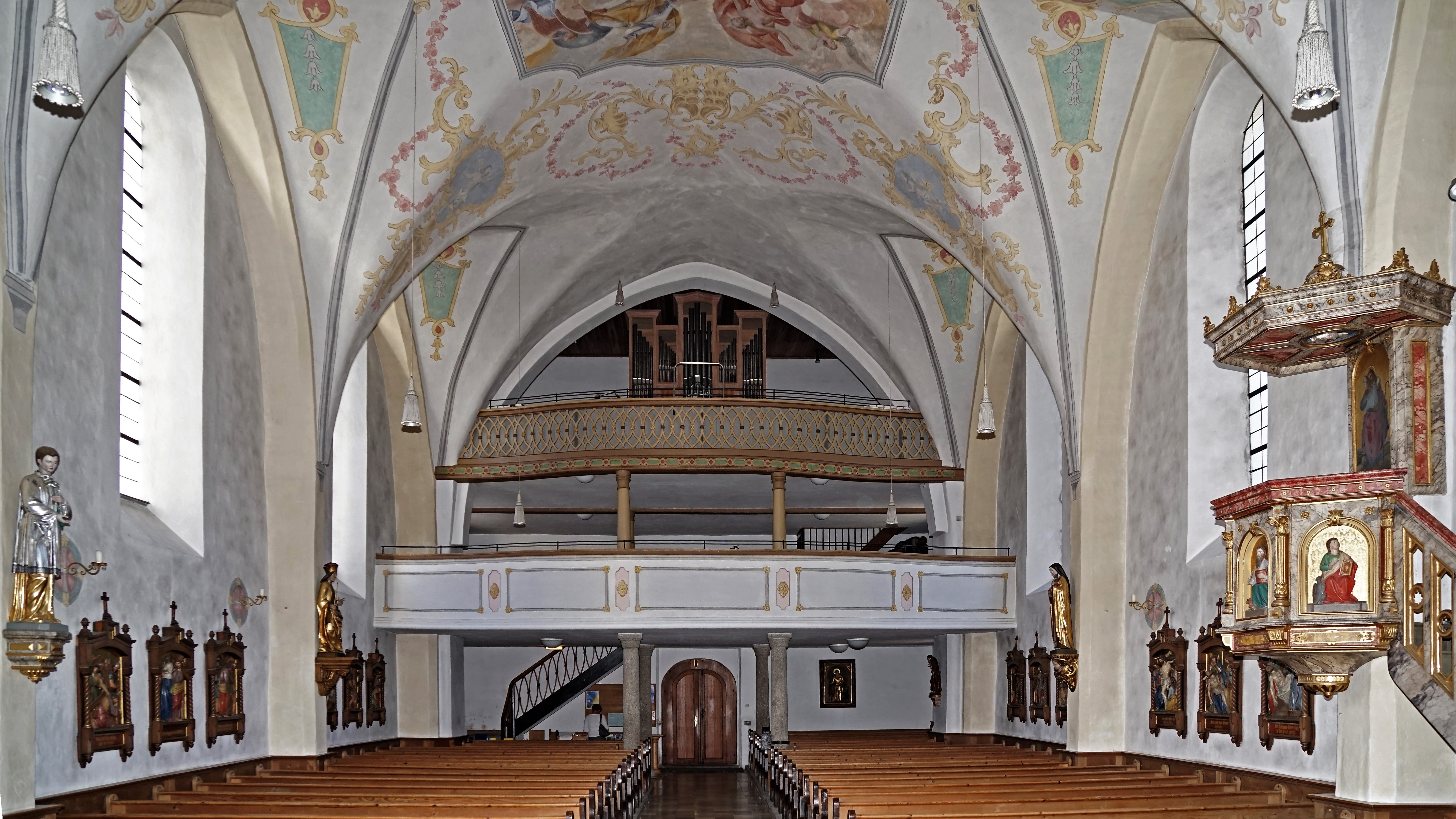 Pfarrkirche St. Margaretha (Frasdorf), Innenansicht gegen die Orgelempore